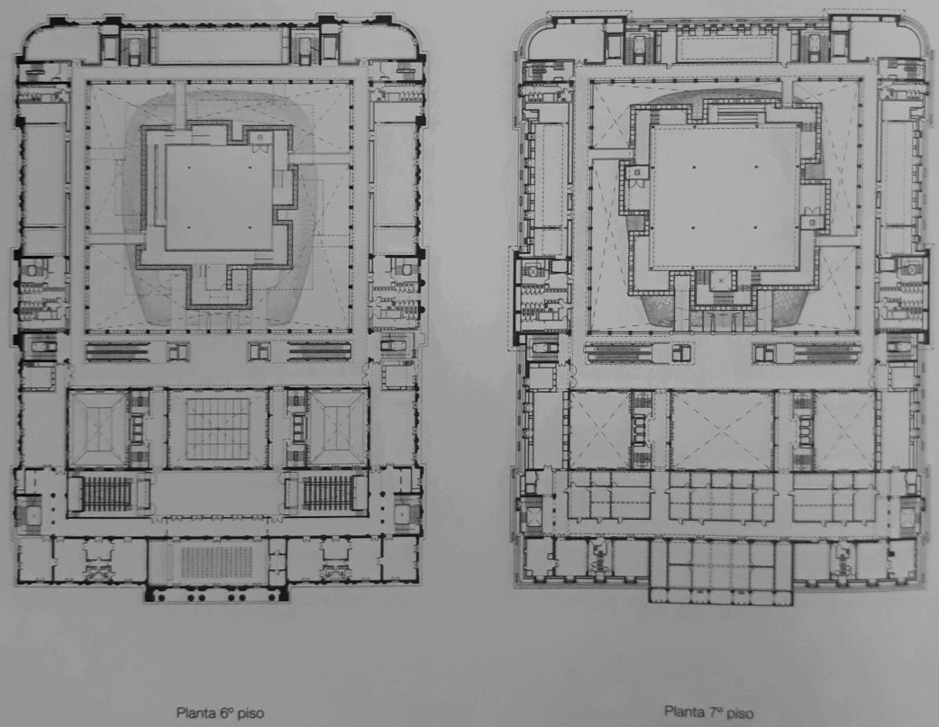 Palacio de Correos, proyecto centro cultural del Bicentenario